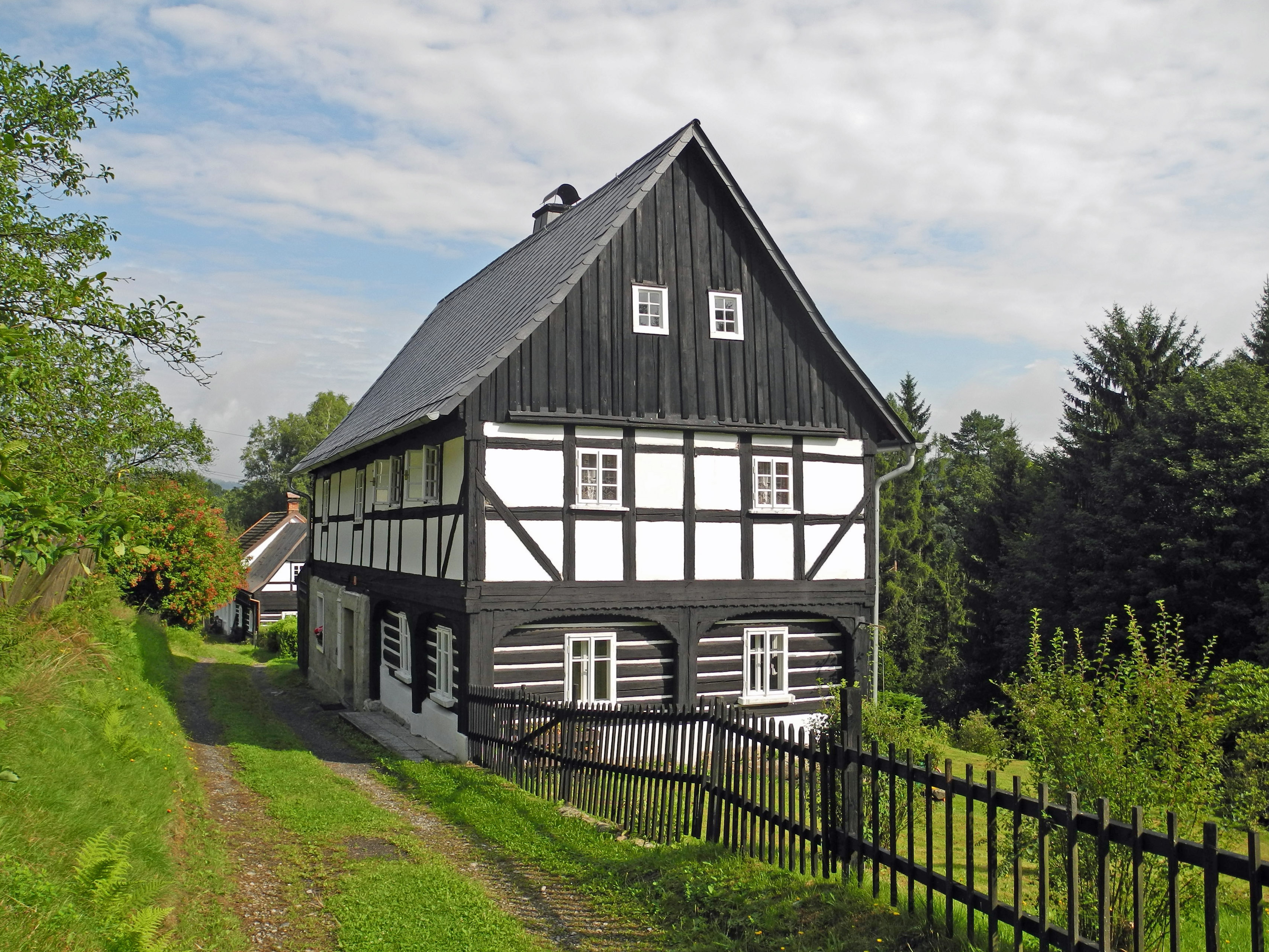 Haus Nr. 8 in Kamenická Stráň (Kamnitzleiten)